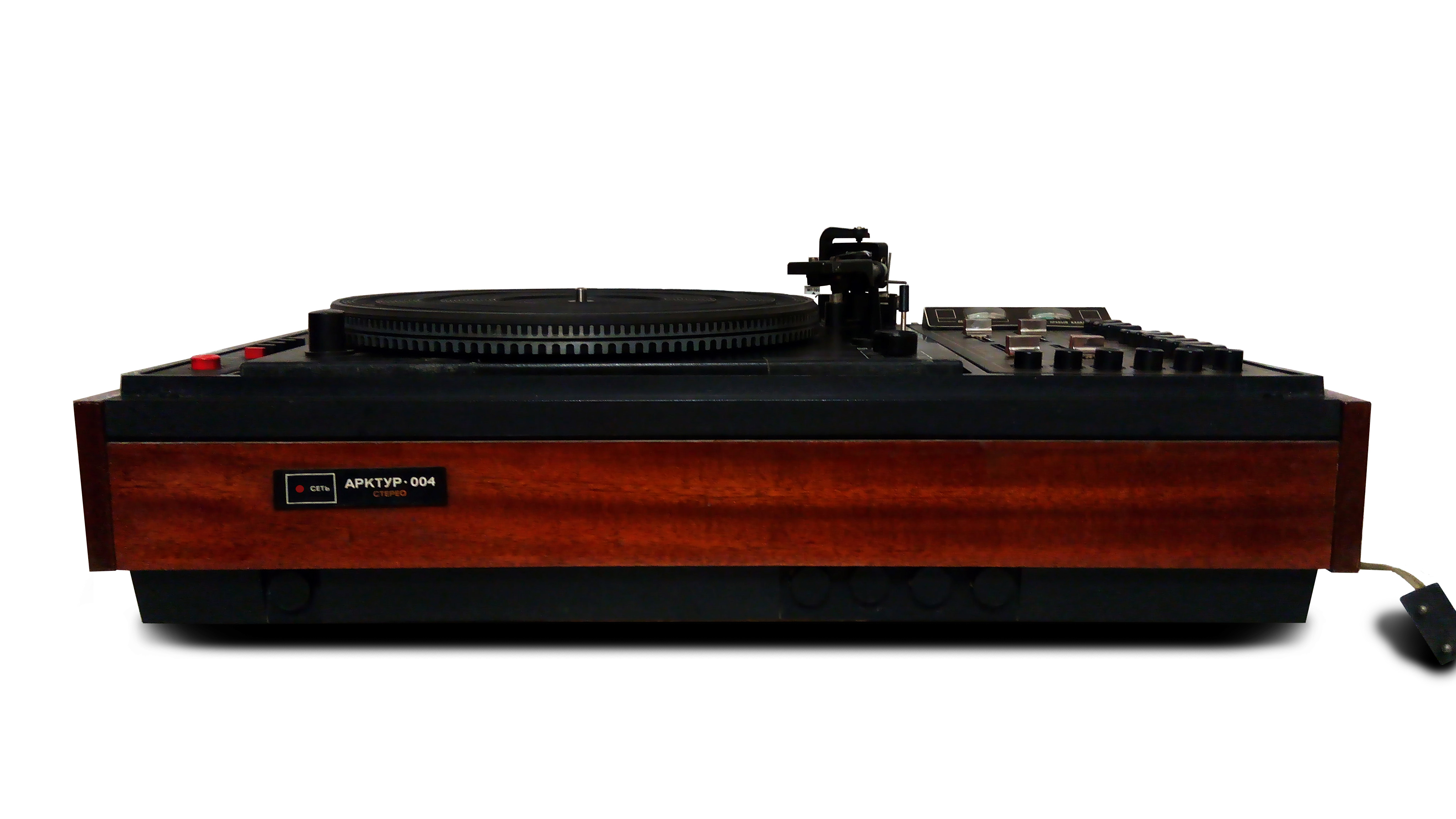 Электрофон Арктур 004 стерео производства Бердского радиозавода "Вега"